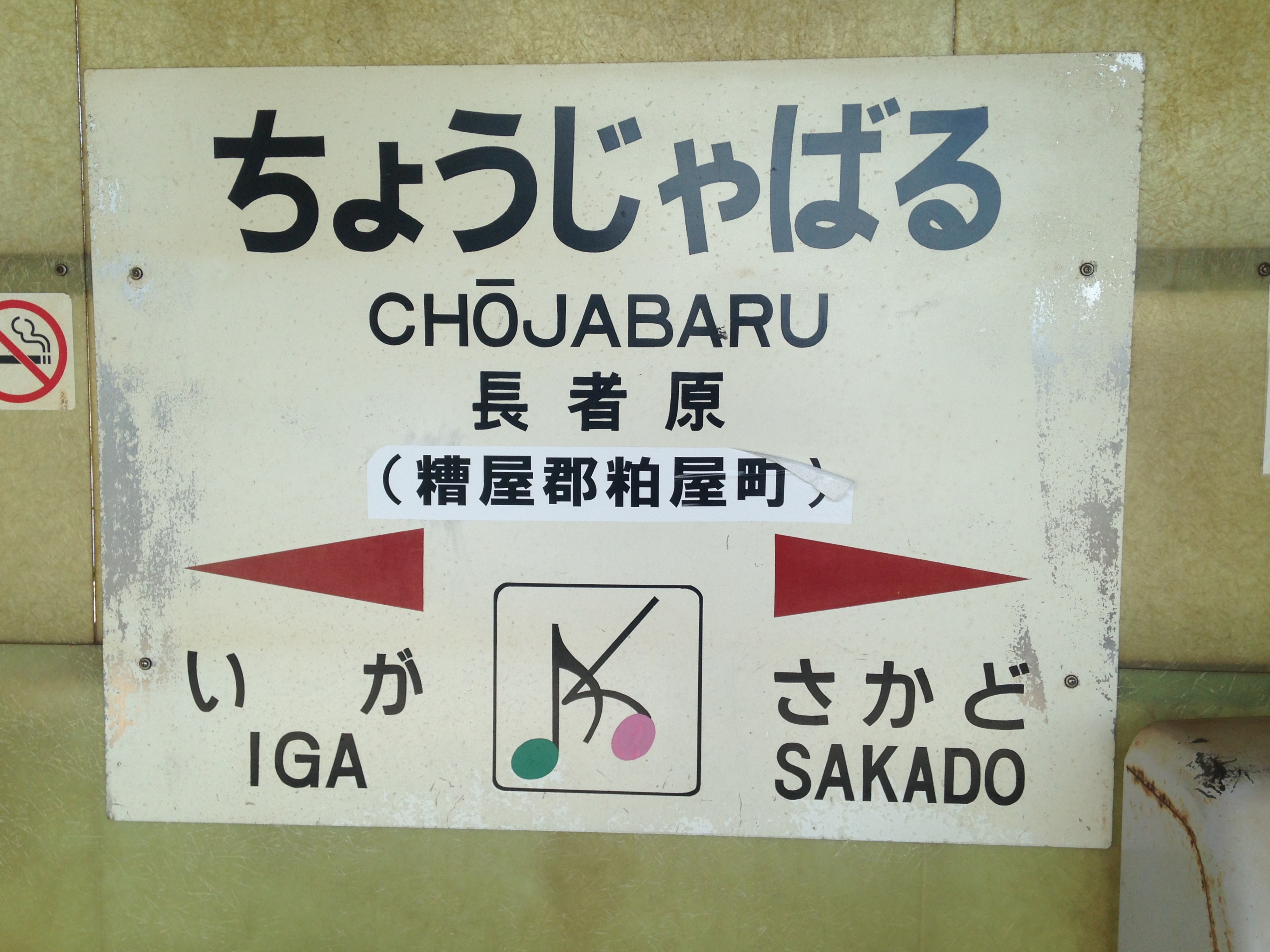 長者原駅(香椎線)の駅名標。イラストは粕屋町のシンボルマーク